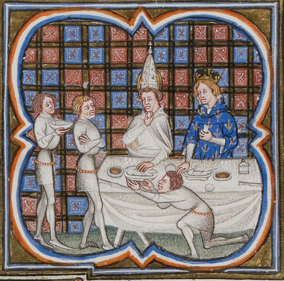 Louis le Bègue recevant le pape Jean VIII.